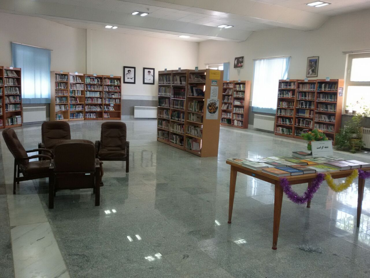 مخزن کتابخانه امام صادق کرند غرب واقع در میدان مصدق